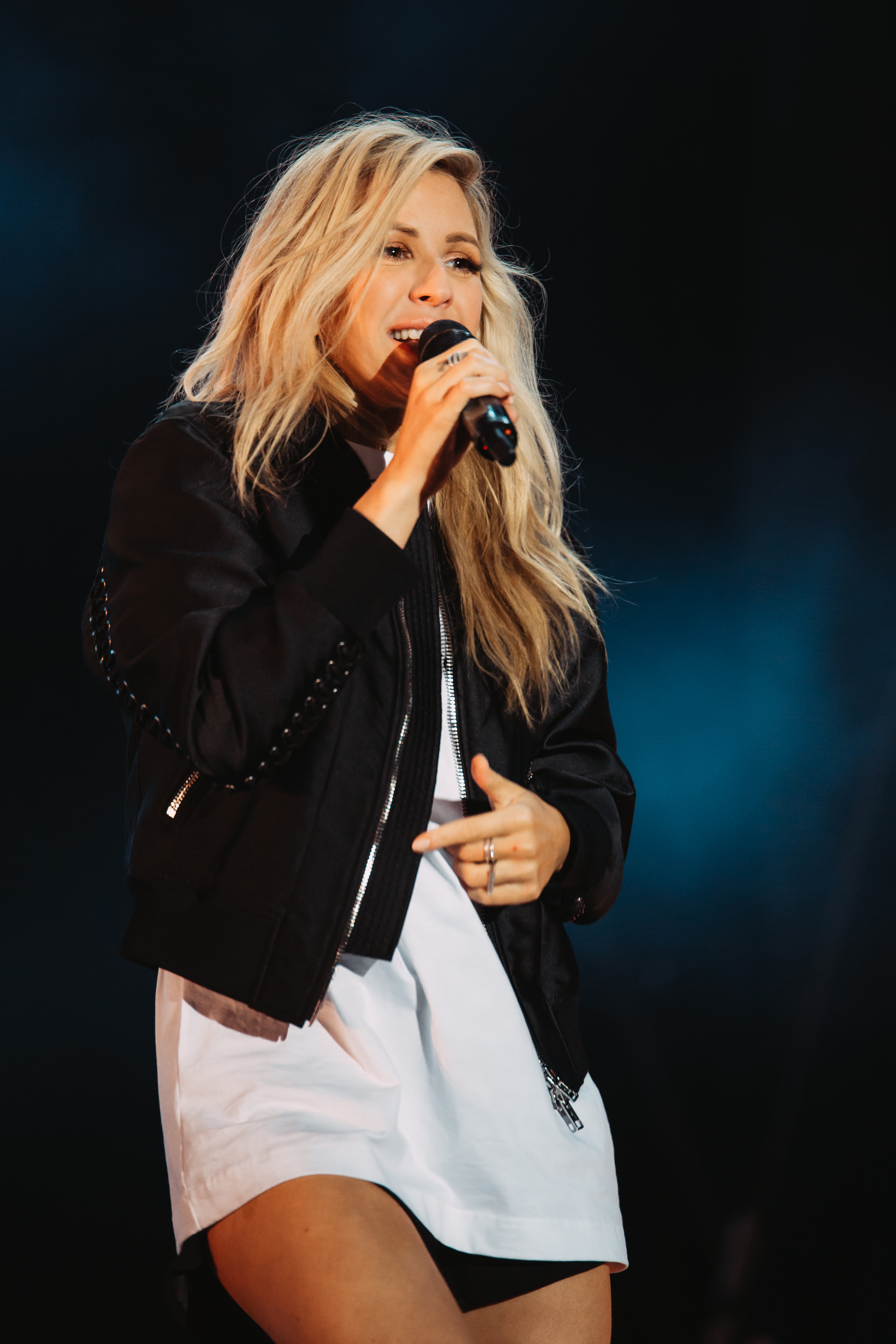 Photo: Krists Luhaers // @Kristsll